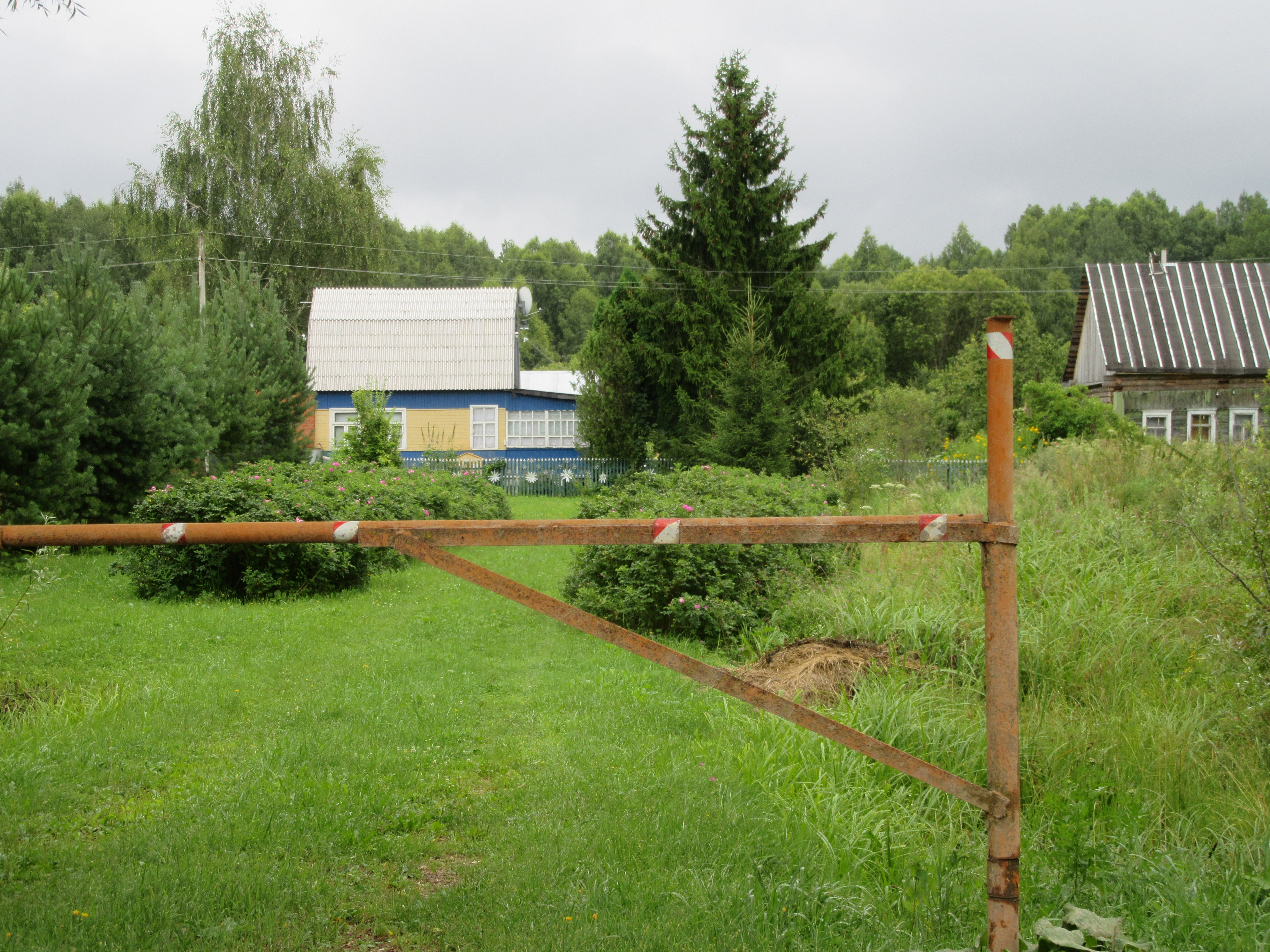 Ивлево (Износковский район)